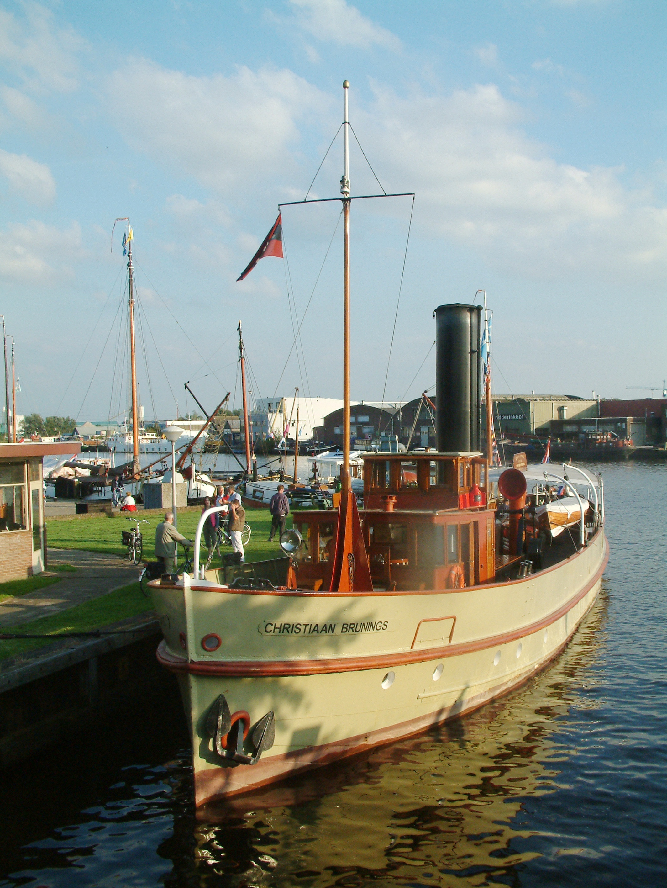 Stoomschip Christiaan Brunings in Hasslt (Ov)